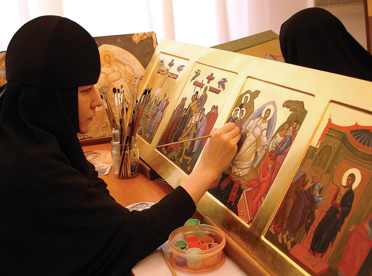 Основным направлением мастерской изначально является возрождение канонической иконописи. Икона канонического письма более других способствует созданию молитвенного настроя. Высшая красота не может быть адекватно передана с помощью обычных художественных средств, поэтому необходимо прибегать к символике, выработанной Церковью на протяжении веков.